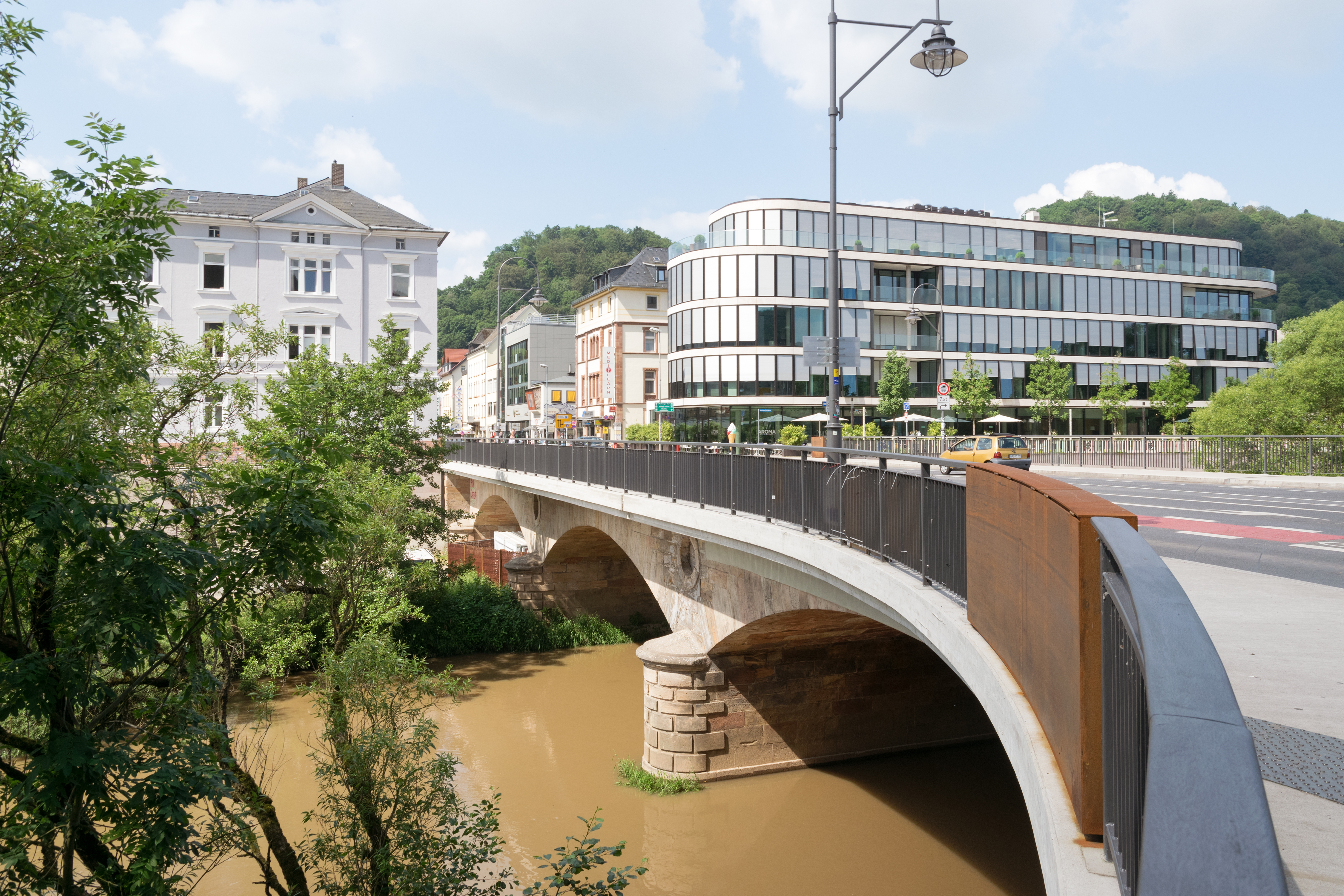 Die Elisabethbrücke in Marburg aus Richtung Osten